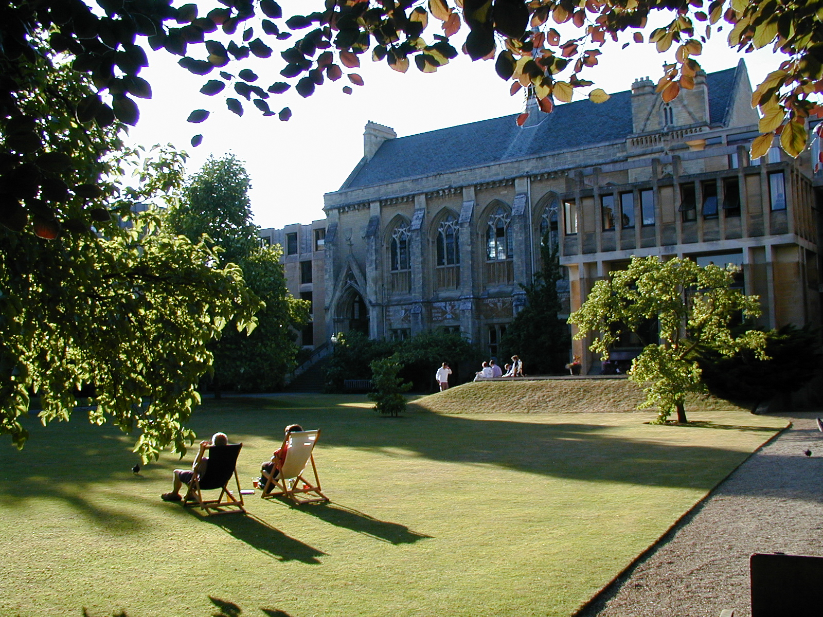 Balliol College Garden